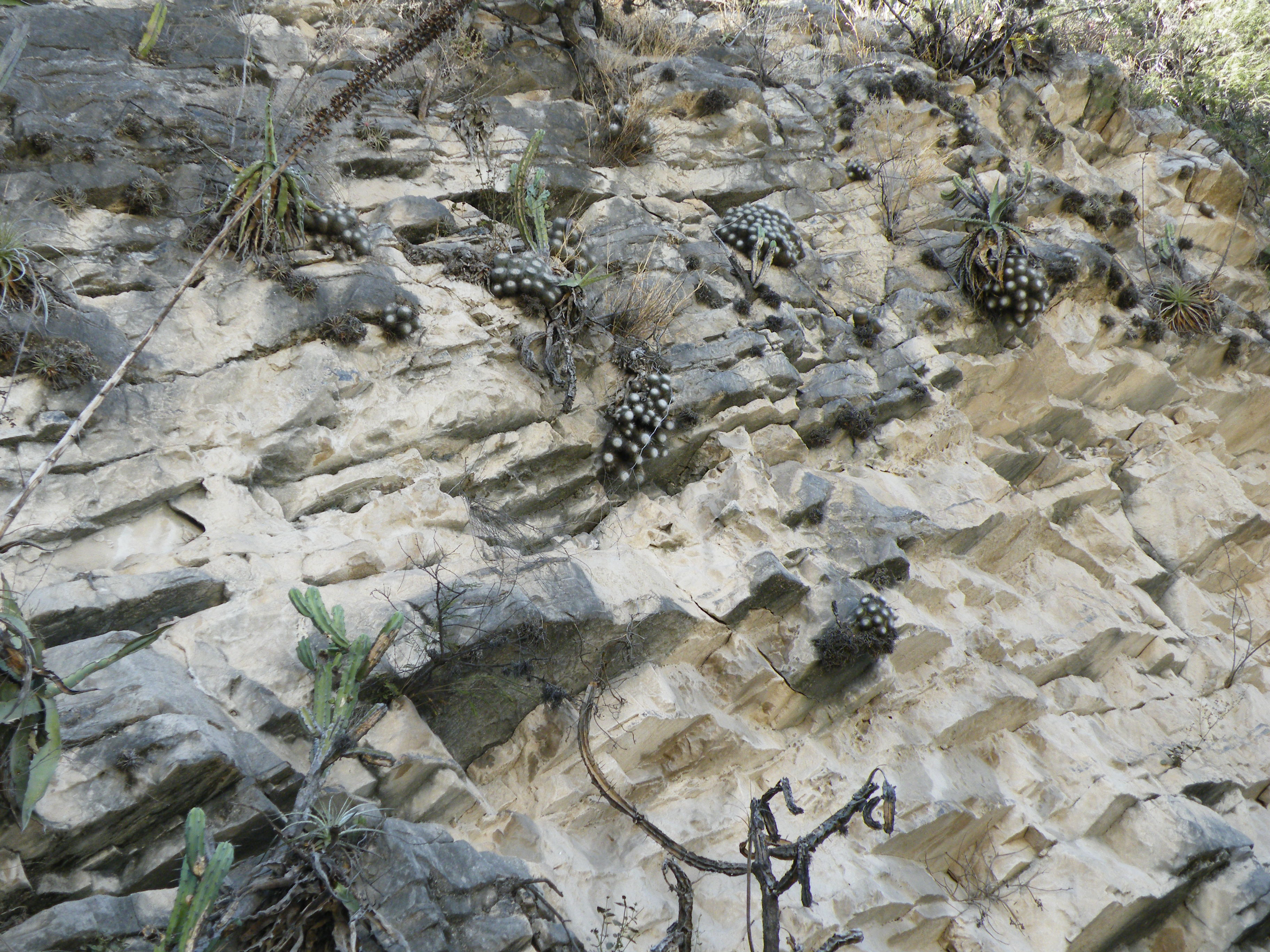 Gilo, Hidalgo